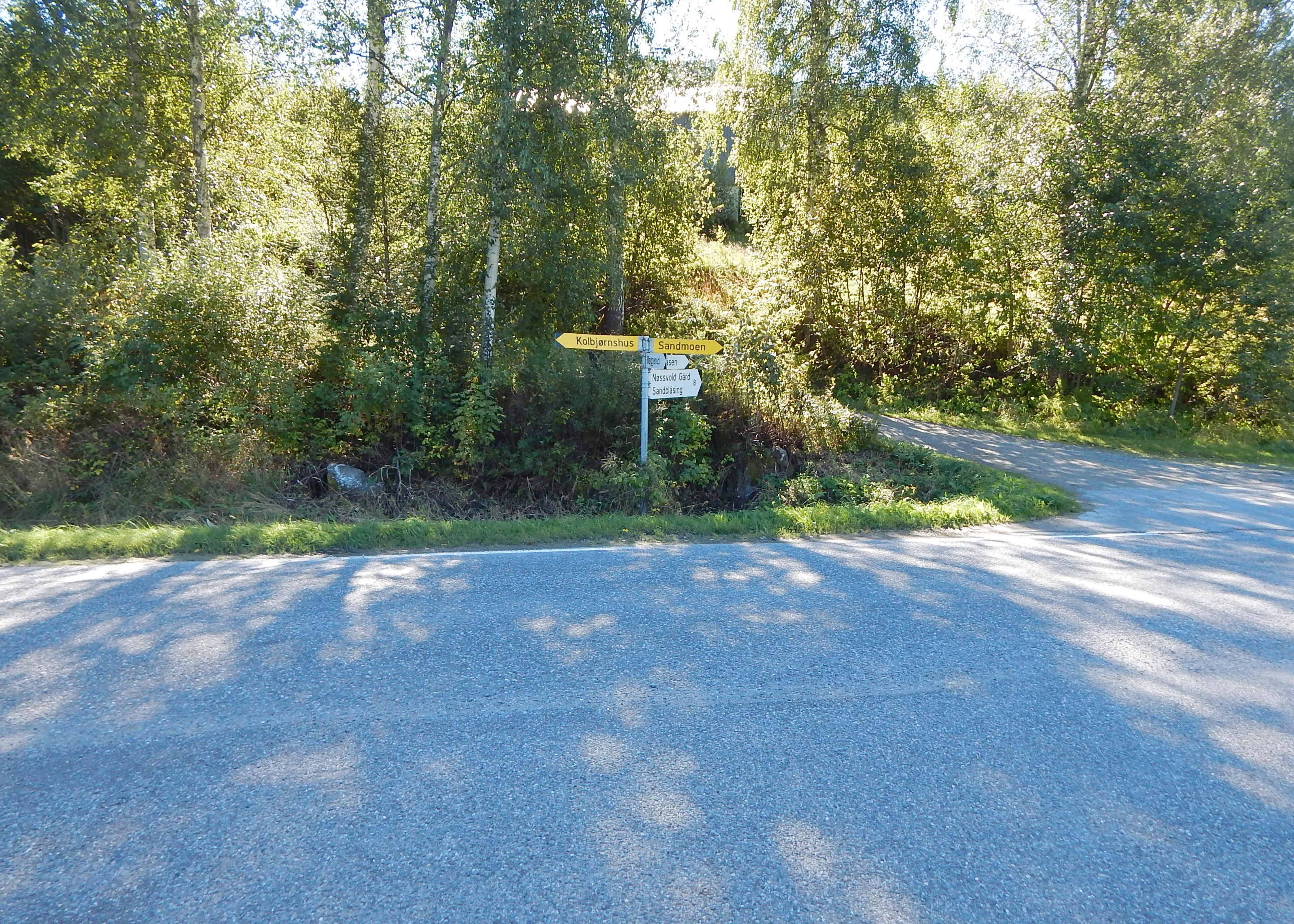 Sandmovegen (FV2426, tidl. FV187) ved det skjeve krysset med Veståsvegen